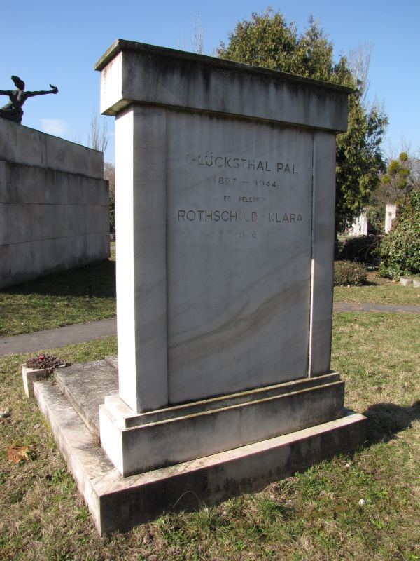 Glückstahl Pál (1897-1944) és felesége Rotschild Klára (1903-1976) divattervező sírja Budapesten. Kerepesi temető: 34-12-16.